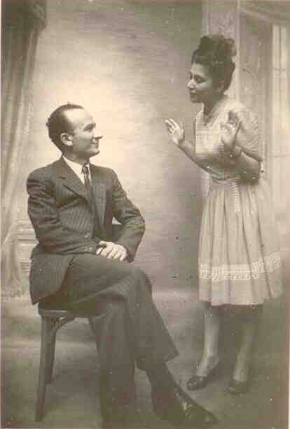 La future actrice de cinéma Esther Gorintin avec son mari David en 1947.